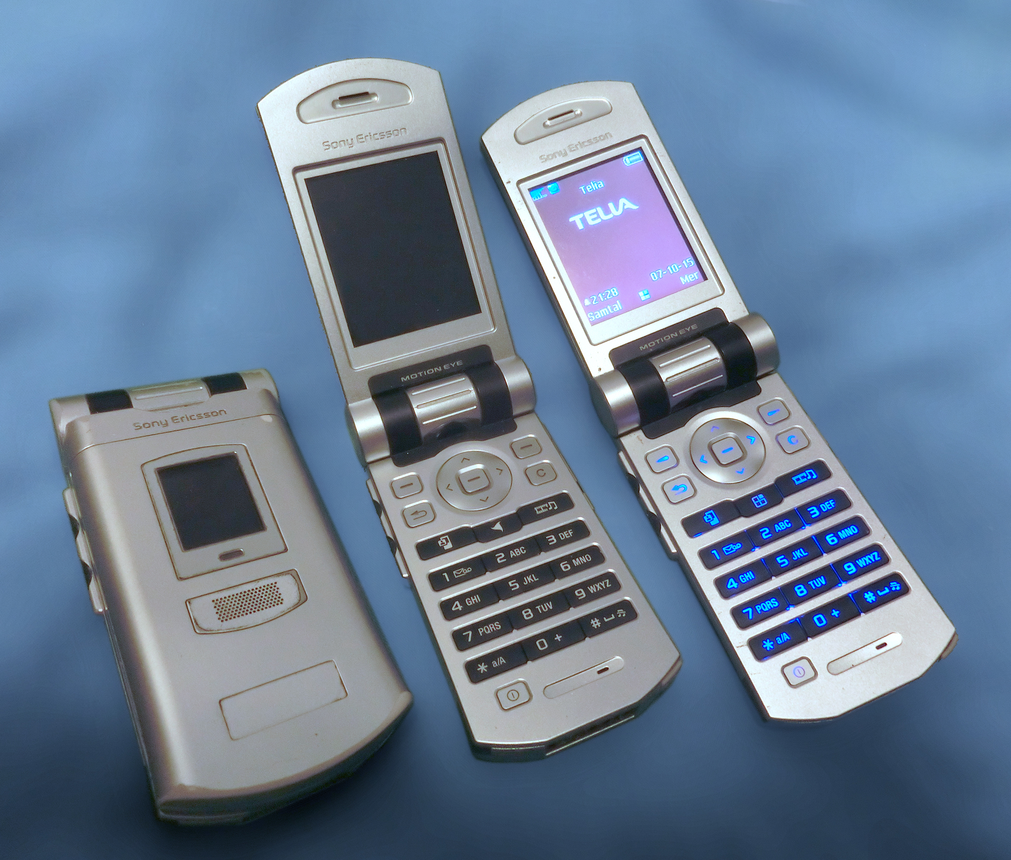 Tre stycken mobiltelefoner av den vikbara modellen Sony Ericsson Z800: den första ihopfälld, den andra utfälld och den tredje utfälld och påslagen. Modellen lanserades 2005.